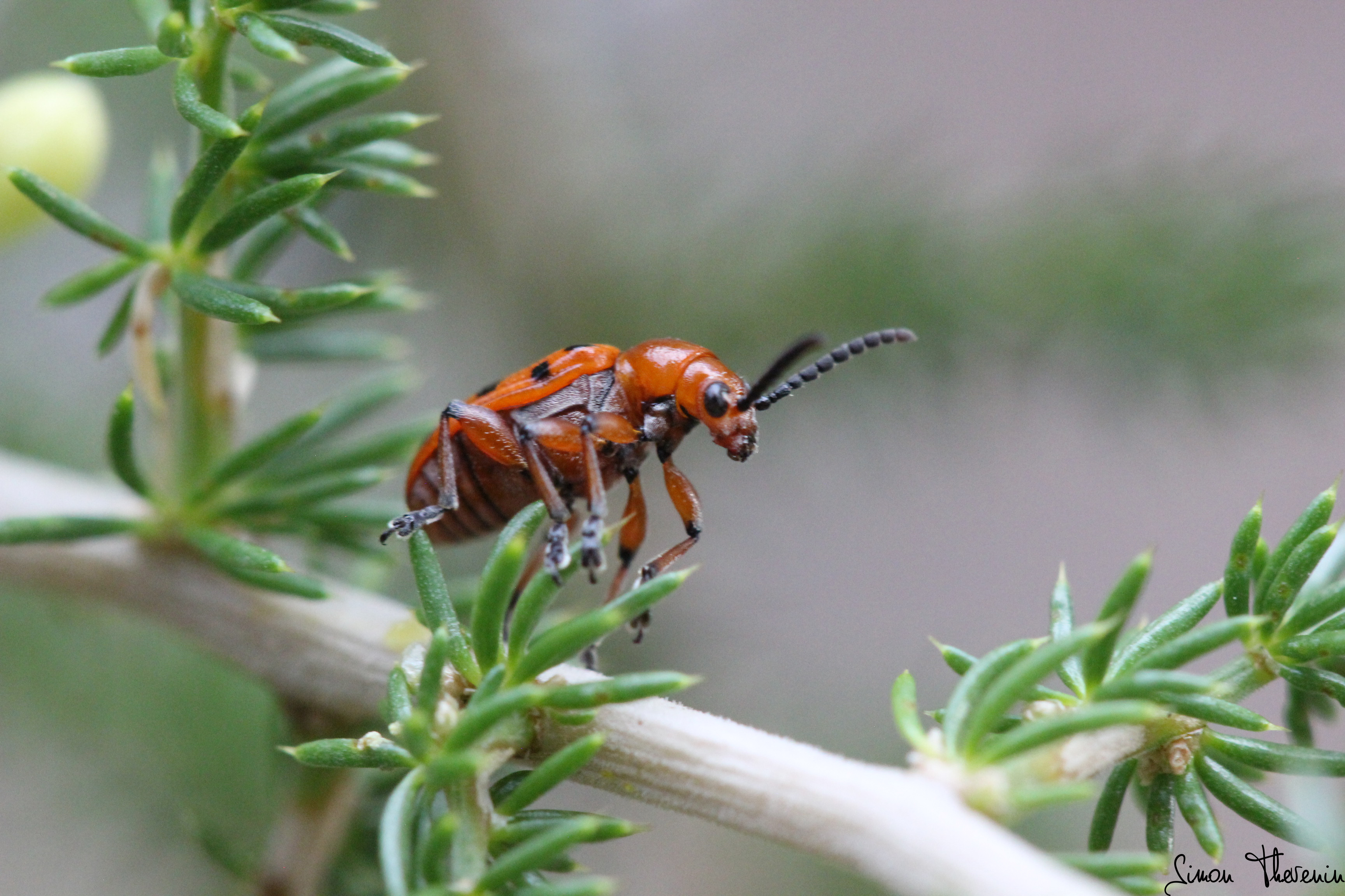 Macro d'un Criocère à douze points sur une Asperge sauvage (Asparagus acutifolius), prise par Simon Thevenin le 26 Juillet 2019 à Rognes